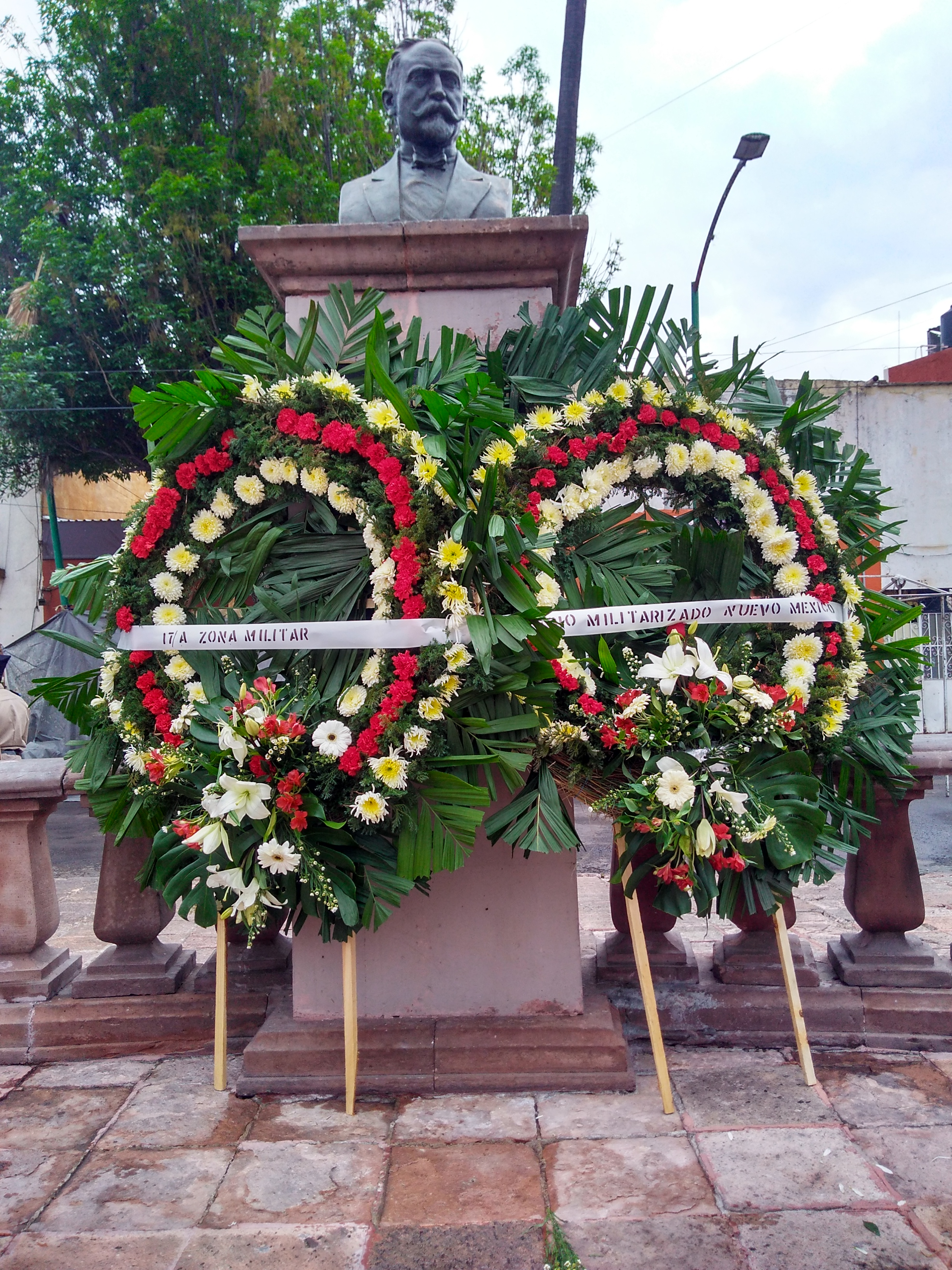 Fotografía del monumento a I. Madero al finalizar la conmemoración del 105° aniversario de La Marcha de la Lealtad.